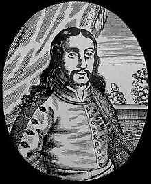 Fran Krsto Frankopan